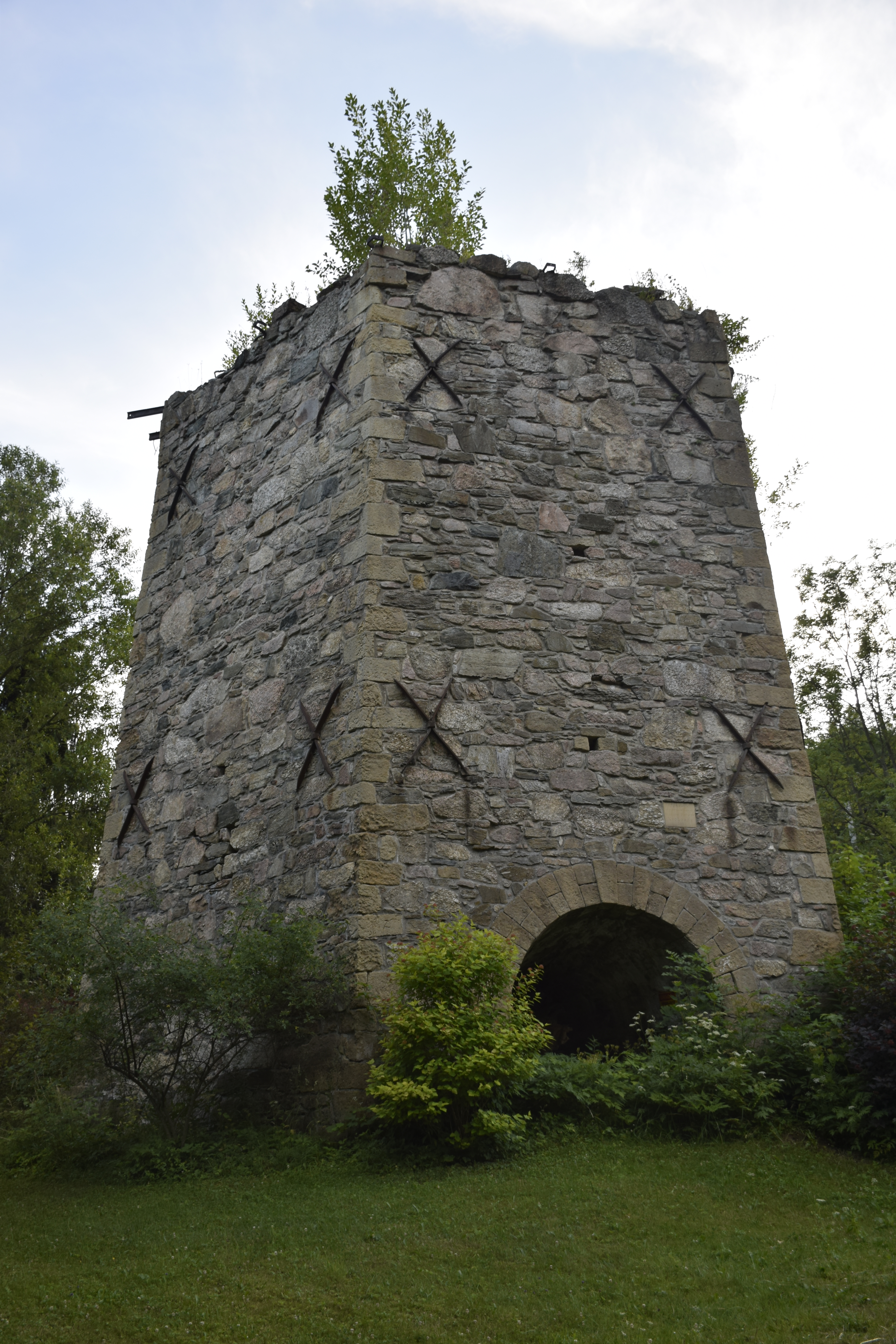 Leszczyniec (województwo dolnośląskie). Polska